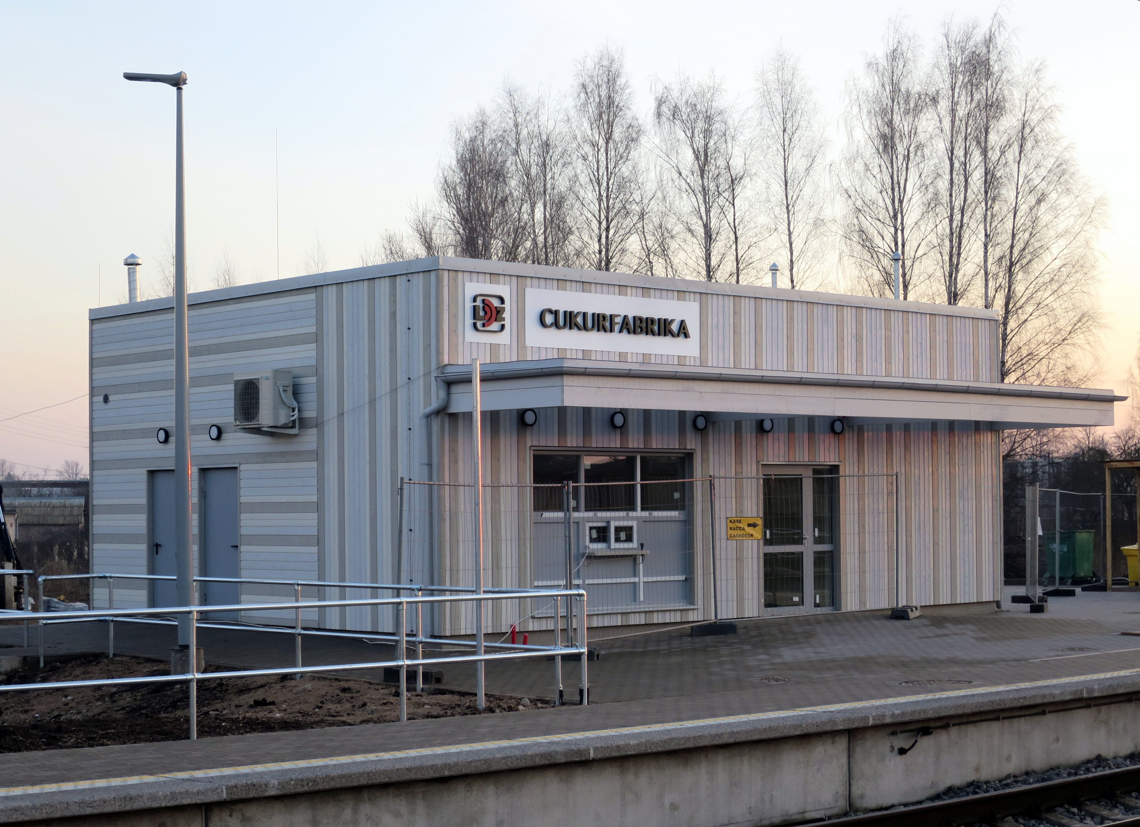 Jaunā stacijas ēka